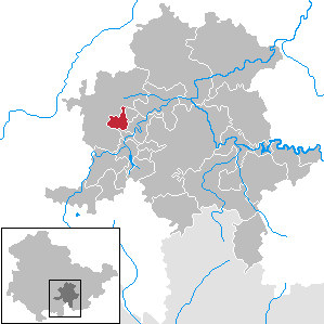 Allendorf in Thuringia - District Saalfeld-Rudolstadt